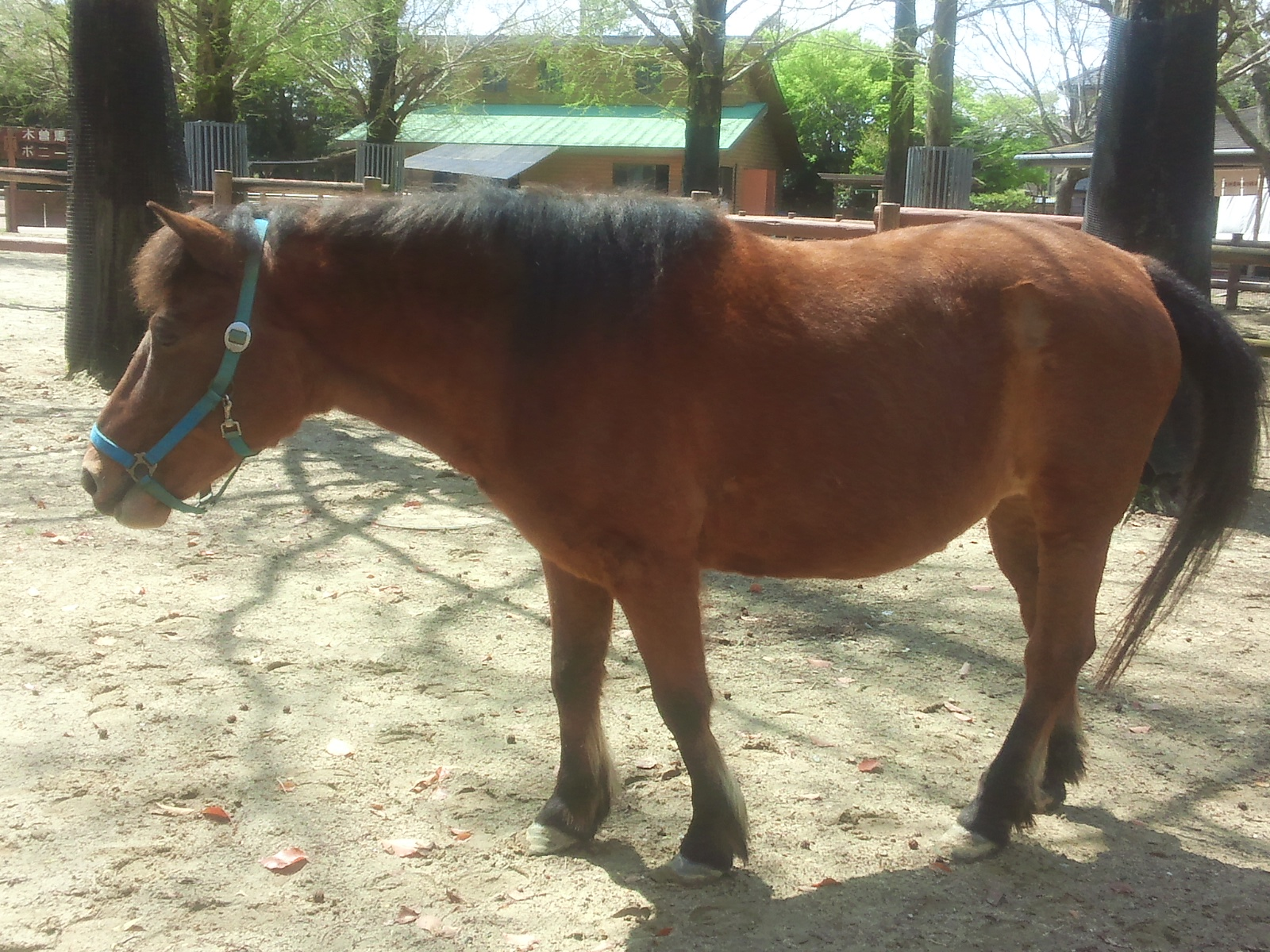 のんほいパーク - 木曽馬